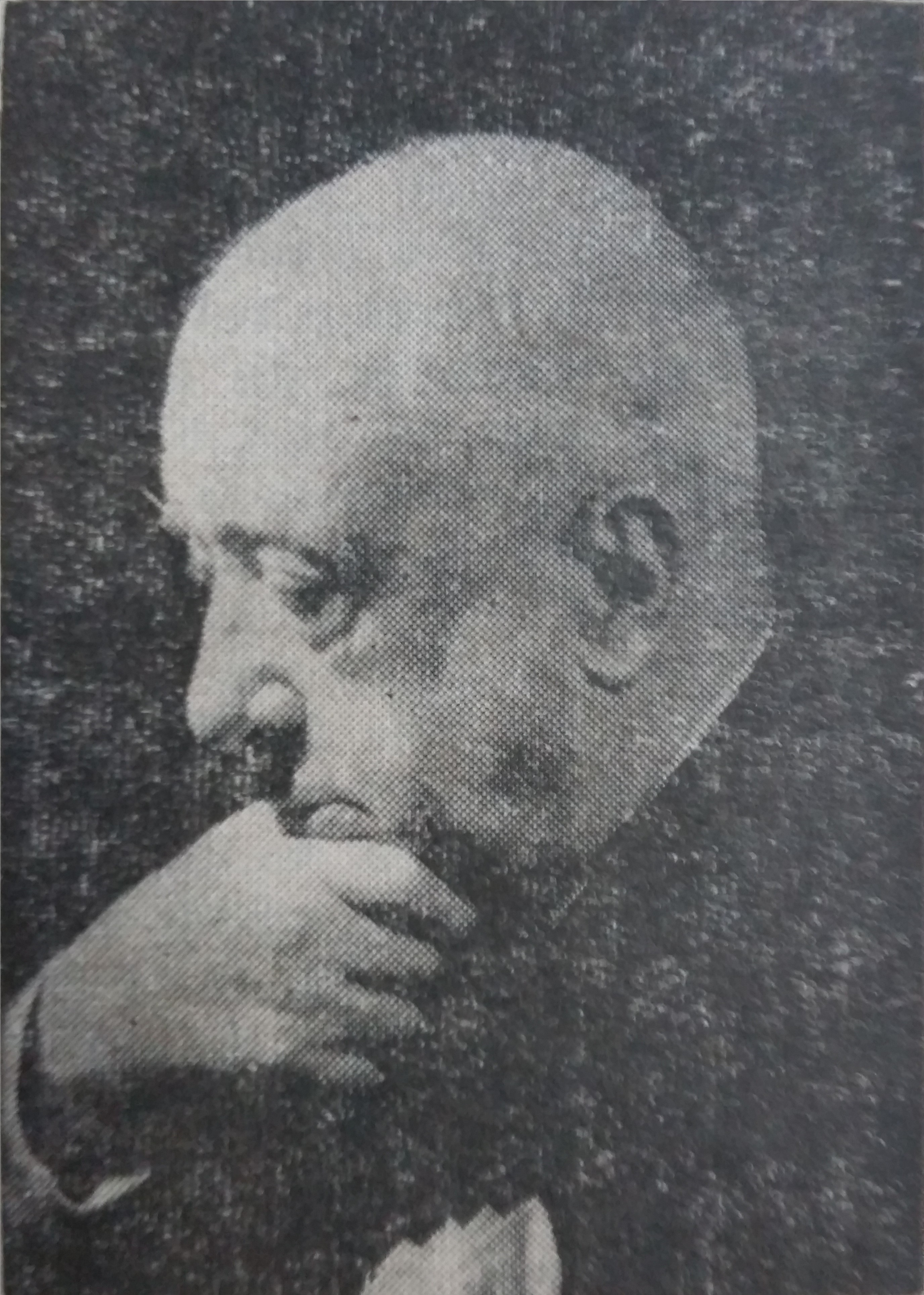 José-Leite-Barbosa